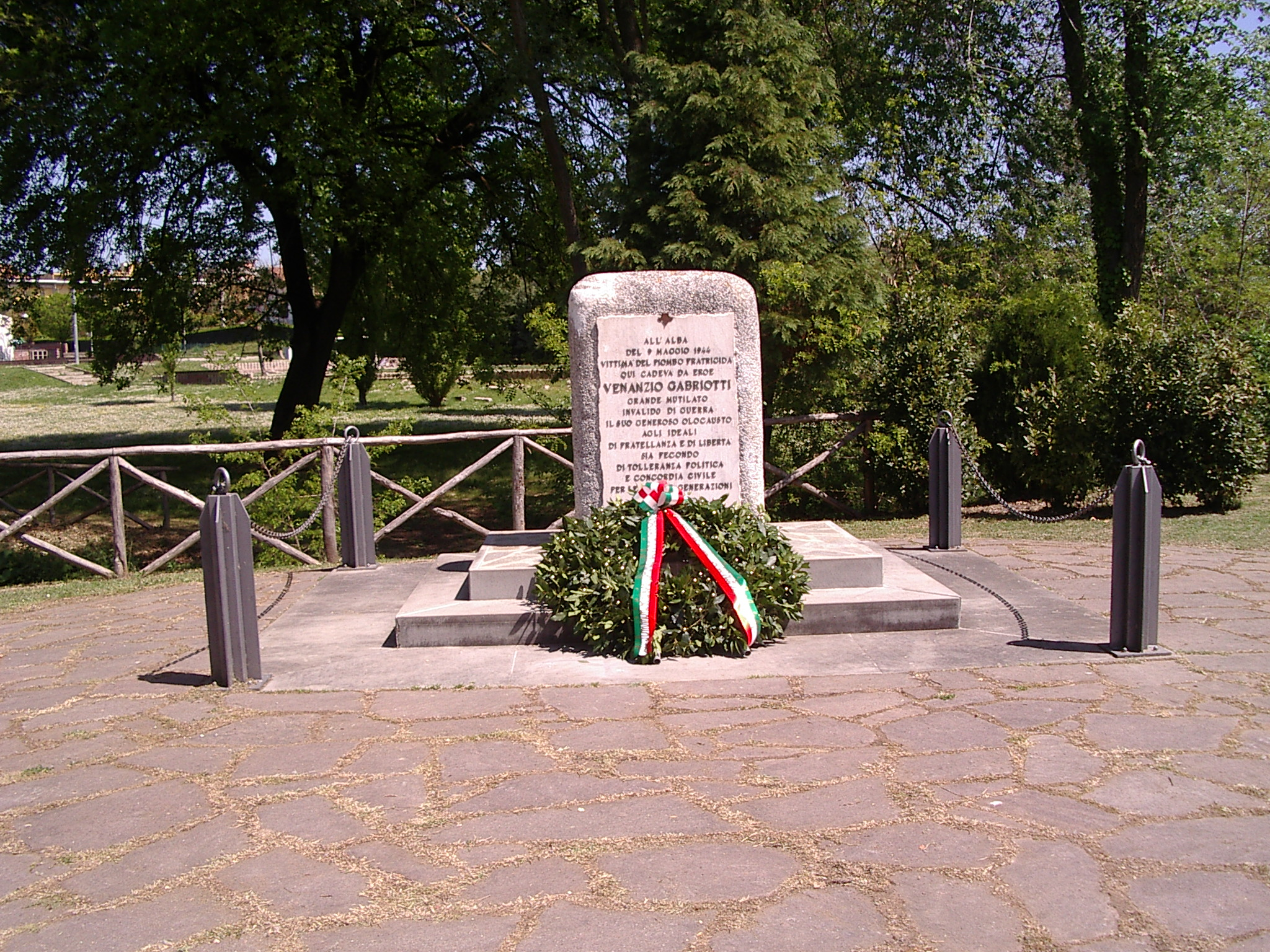 Città di Castello Stèle Venanzio Gabriotti resistant omnbrie Italy